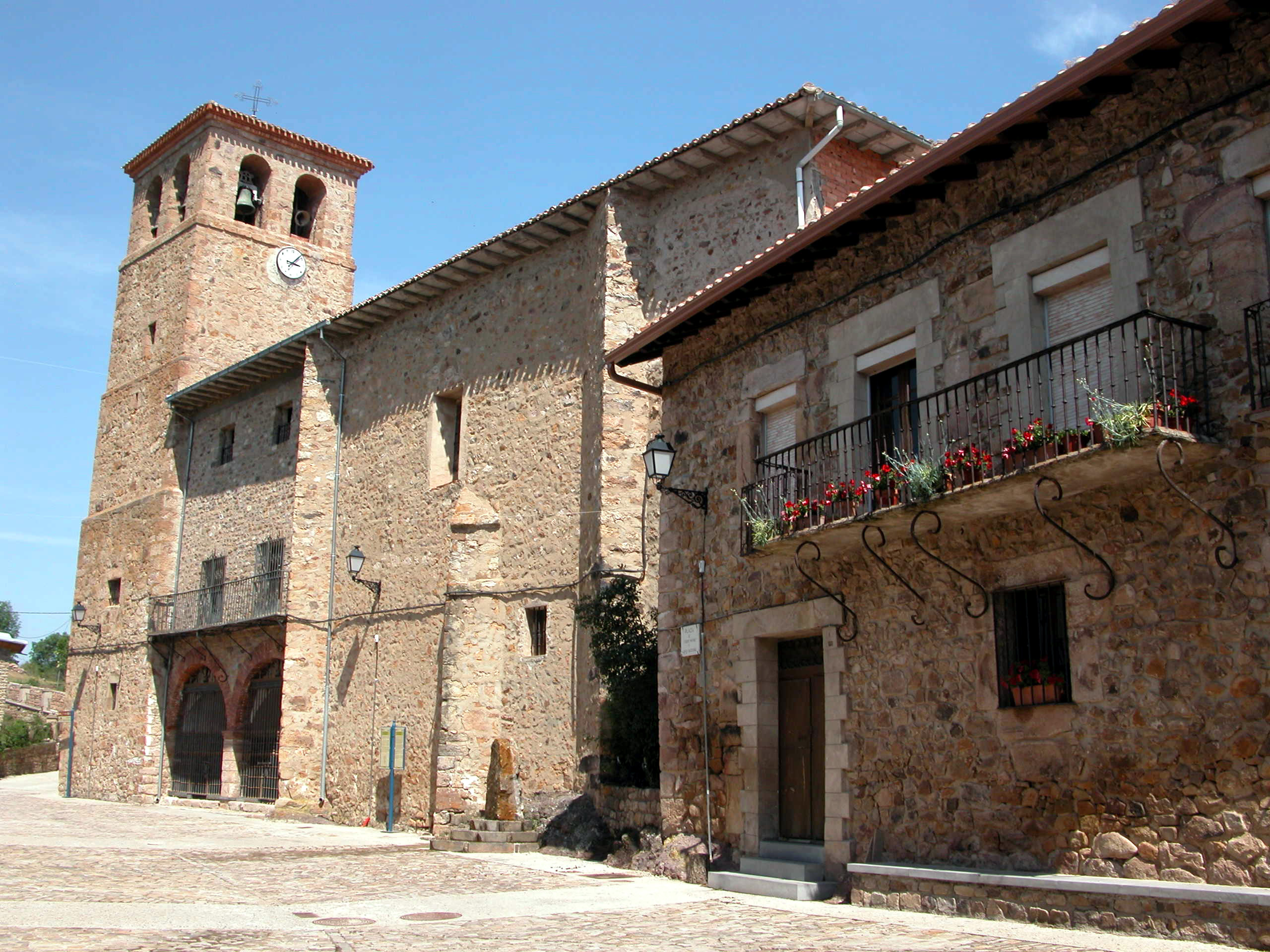 Iglesia de San Bartolomé en Lumbreras, La Rioja - España.